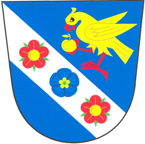 znak, Přehořov, okres Tábor